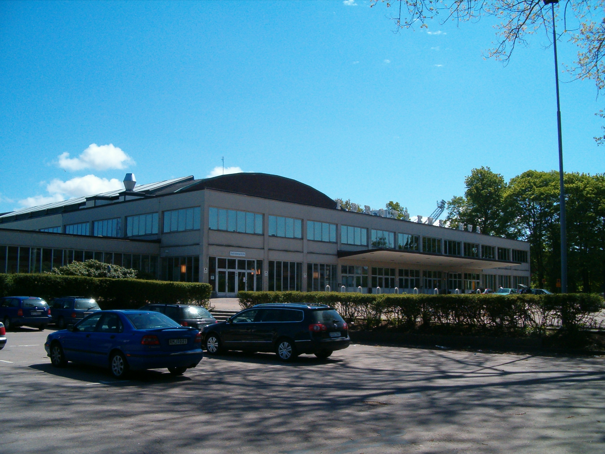 Idrottens hus, indoor arena in Helsingborg, Sweden.